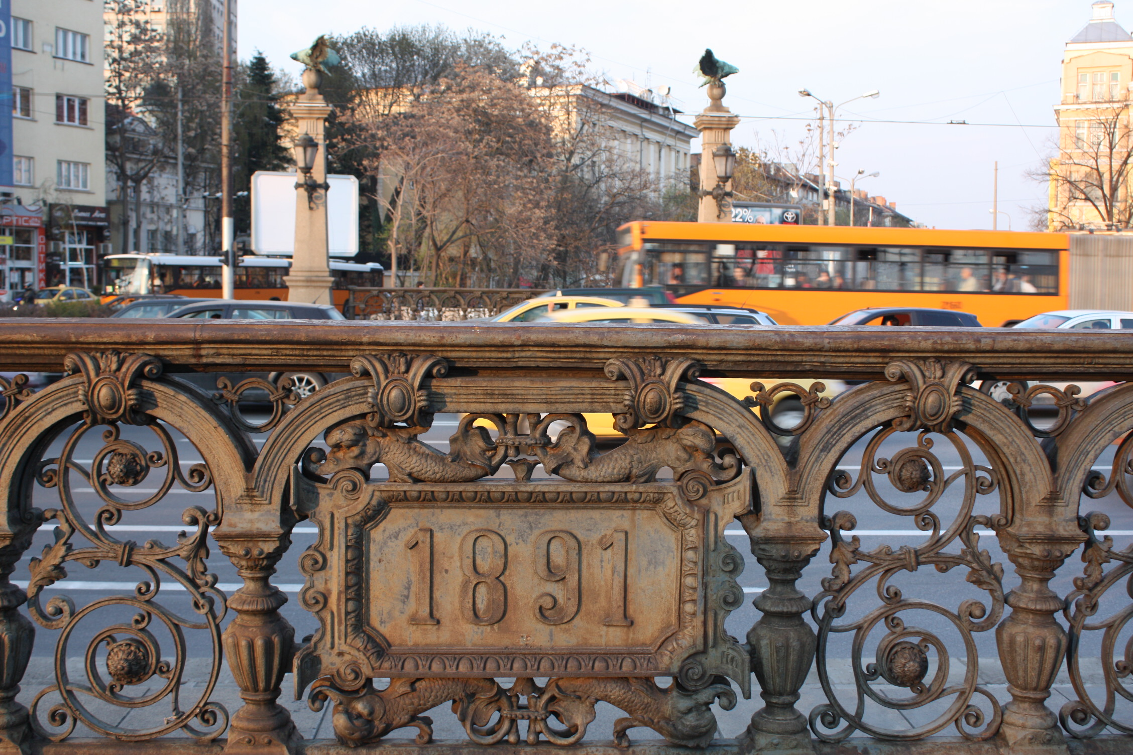 Adlerbrücke, Orlov most, Орлов мост, Sofia, Bulgaria